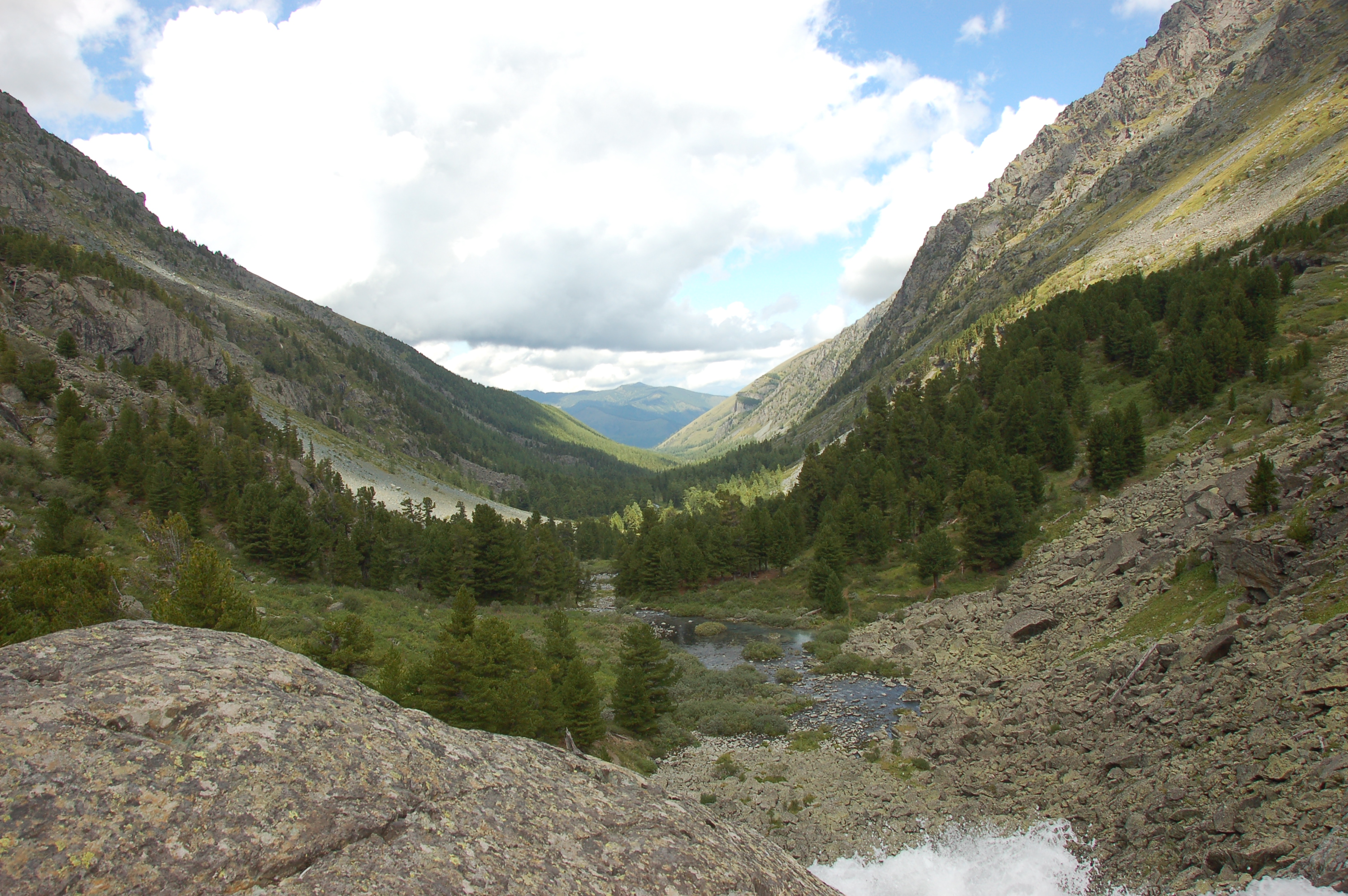 Распадок